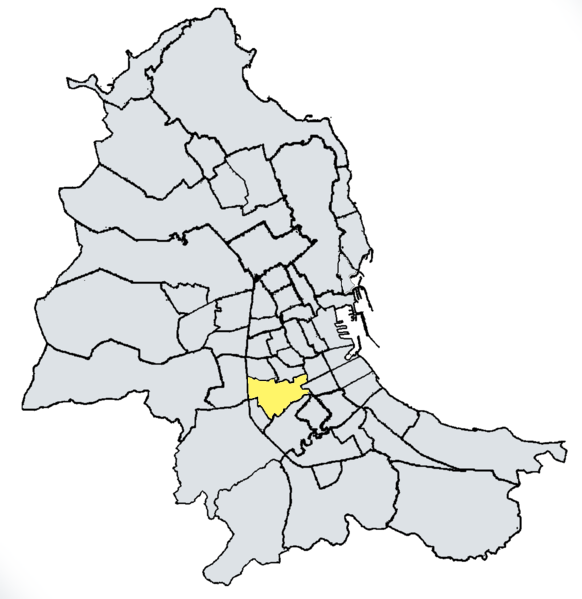 Cuba-Calatafimi